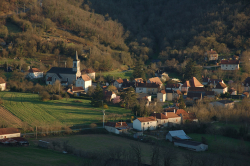 Saujac